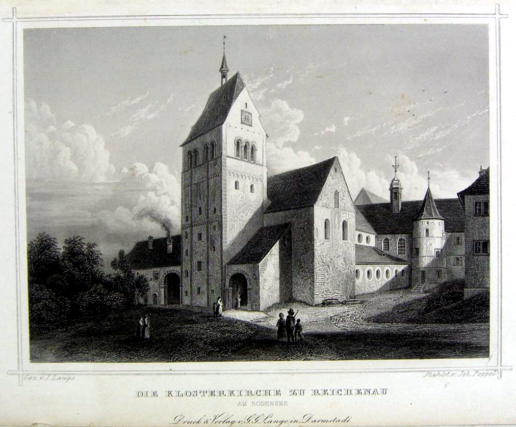 Die Klosterkirche zu Reichenau. Stich, 19. Jh.